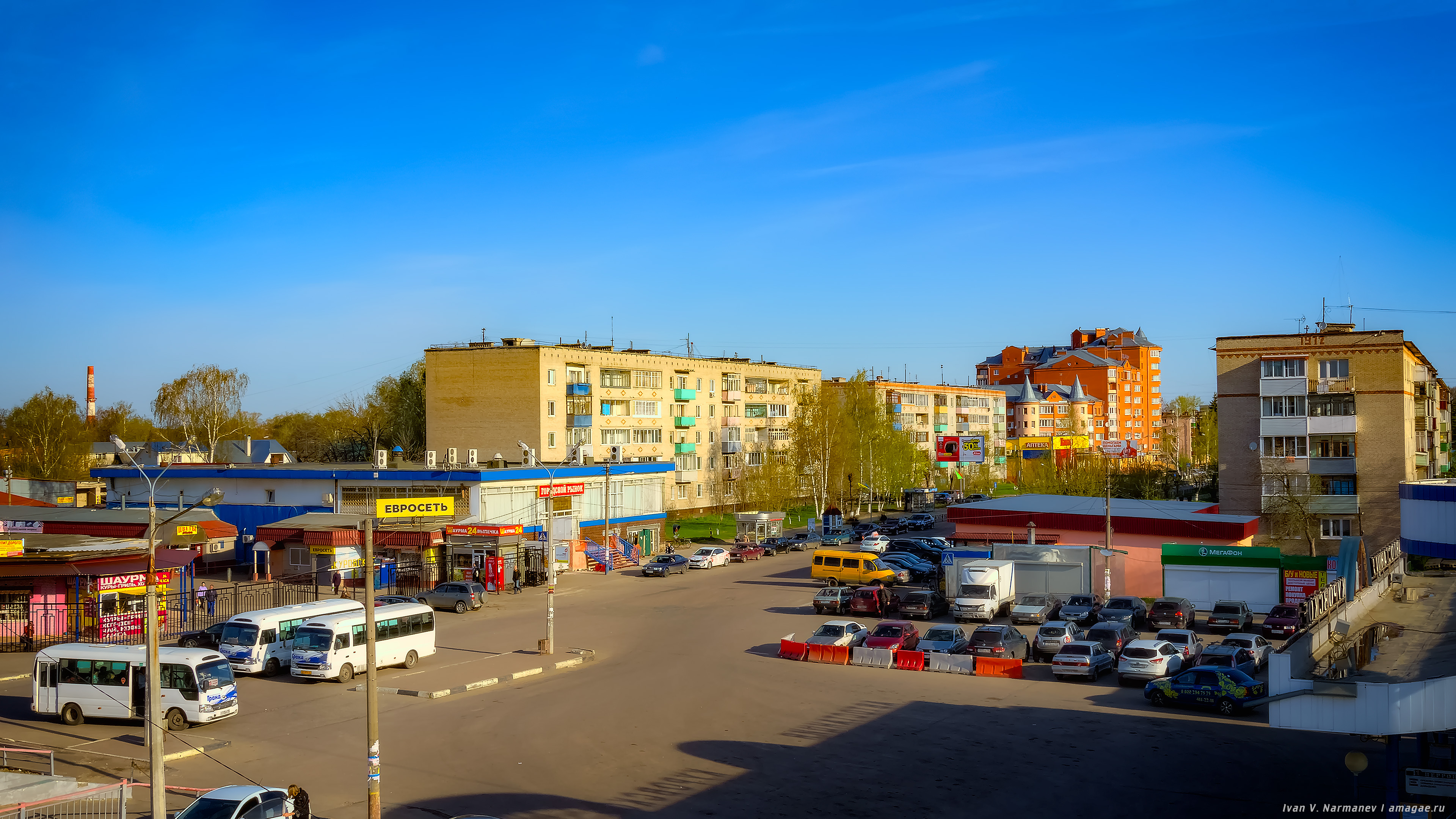 Привокзальная площадь г.Куровское